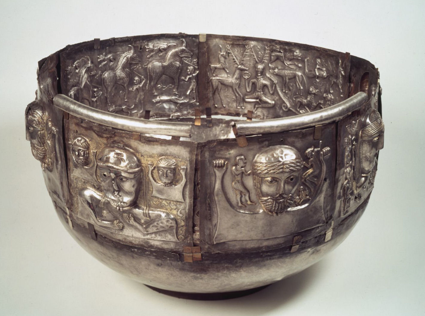 Gundestrupkarret, votiv/depot førromersk jernalder, Års sogn, Års Herred, Aalborg Amt